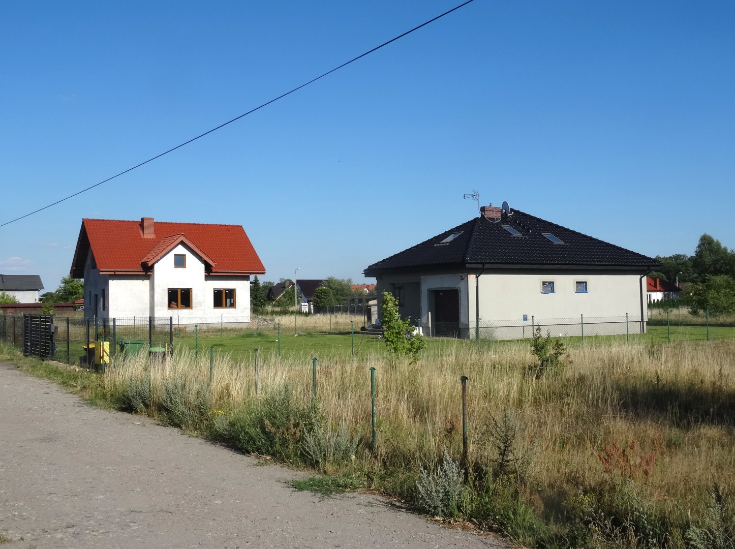 Łochowice, gm. Białe Błota, powiat bydgoski